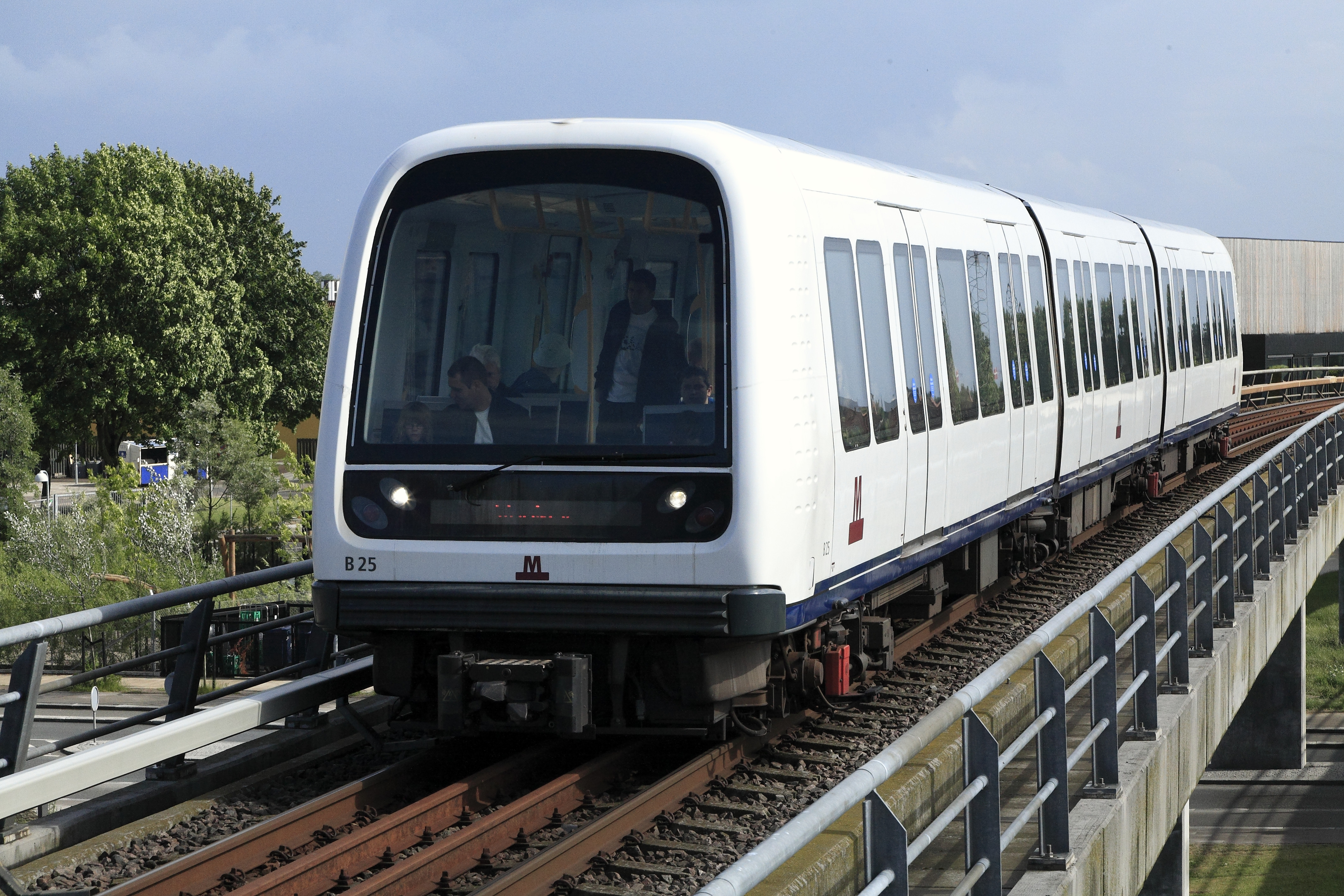 Linie M1, Zug von Vestamager nach Vanløse. Der lokführerlose Betrieb sorgt für eine hervorragende und gern genutzte Streckensicht der Fahrgäste.